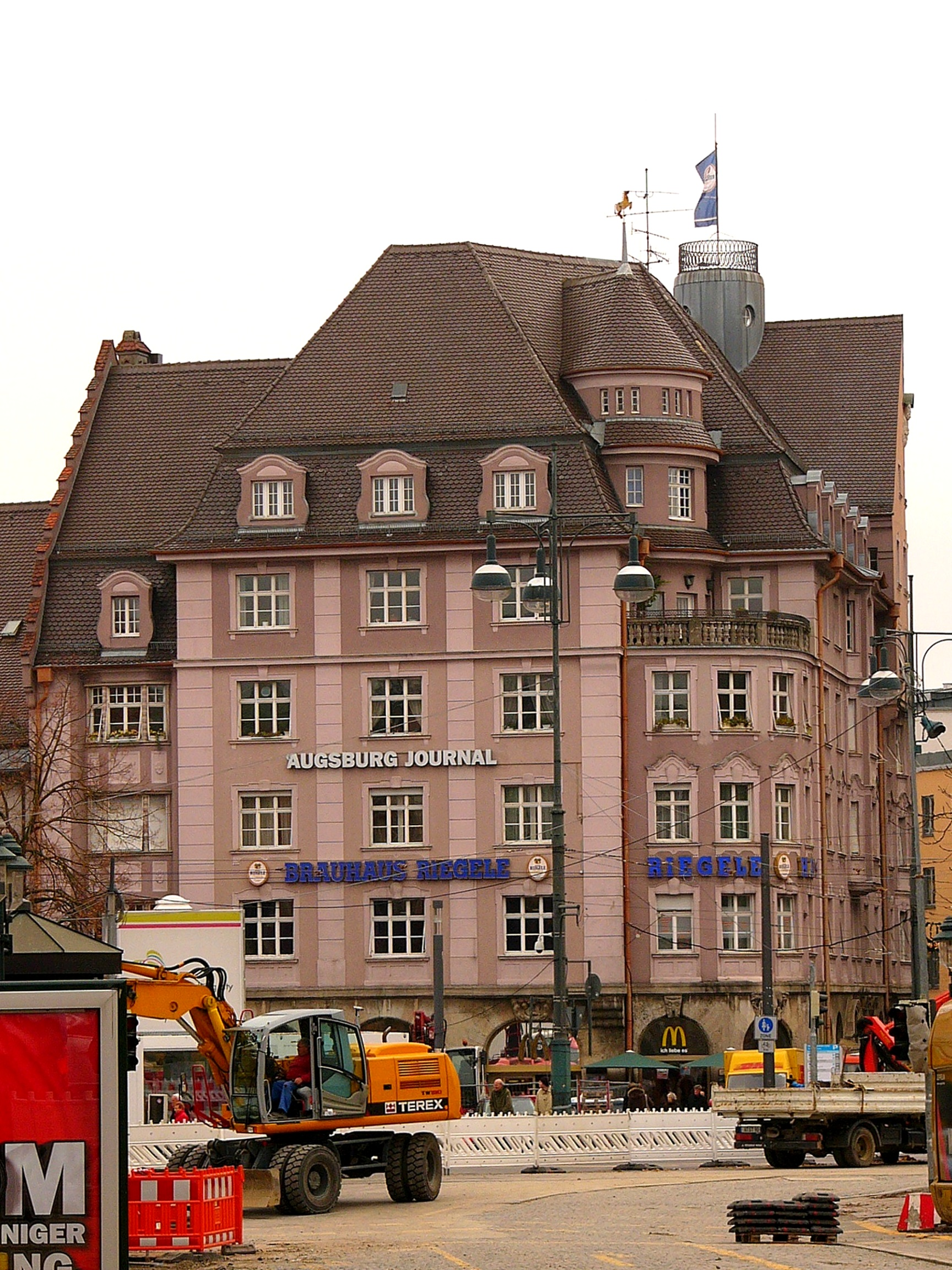 Ehem. Gaststätte Riegele, sog. Riegele-Block, stattlicher fünfgeschossiger, neubarocker Eckbau, durch Giebel, Erker und Dachaufbauten reich gegliederter plastischer Baukörper in der Augsburger Tradition, von Hans Schnell, 1912/15.This is a photograph of an architectural monument.